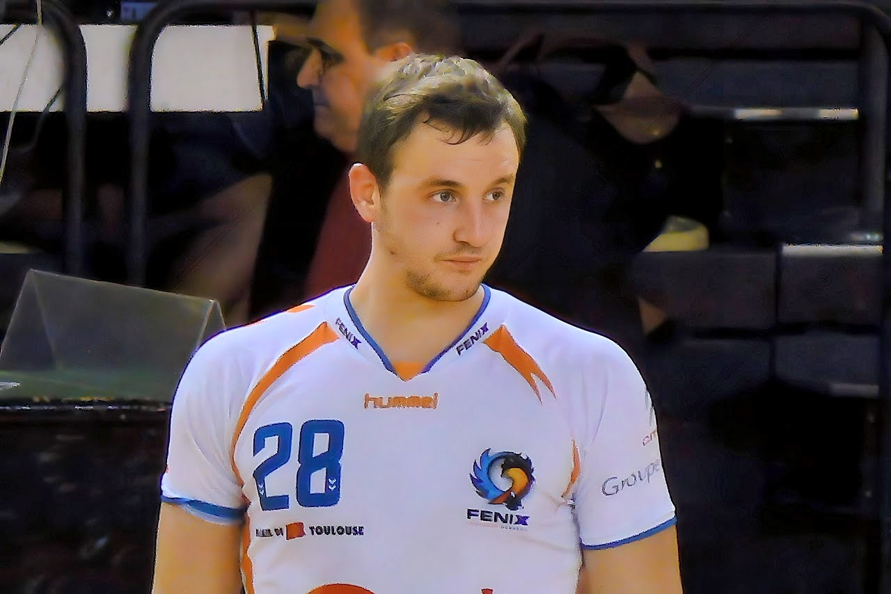 Valentin Porte lors de la rencontre US Ivry / Toulouse Handball le 15 mars 2014.